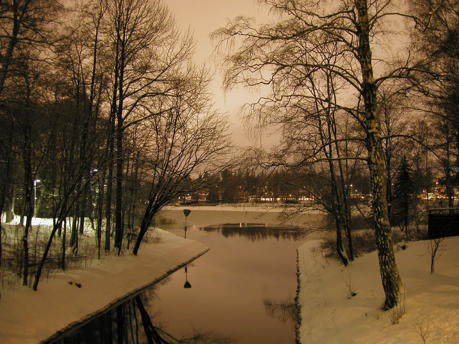 First snow on the Laajasalon Kanava between Tammisalo and Laajasalo at night, Helsinki